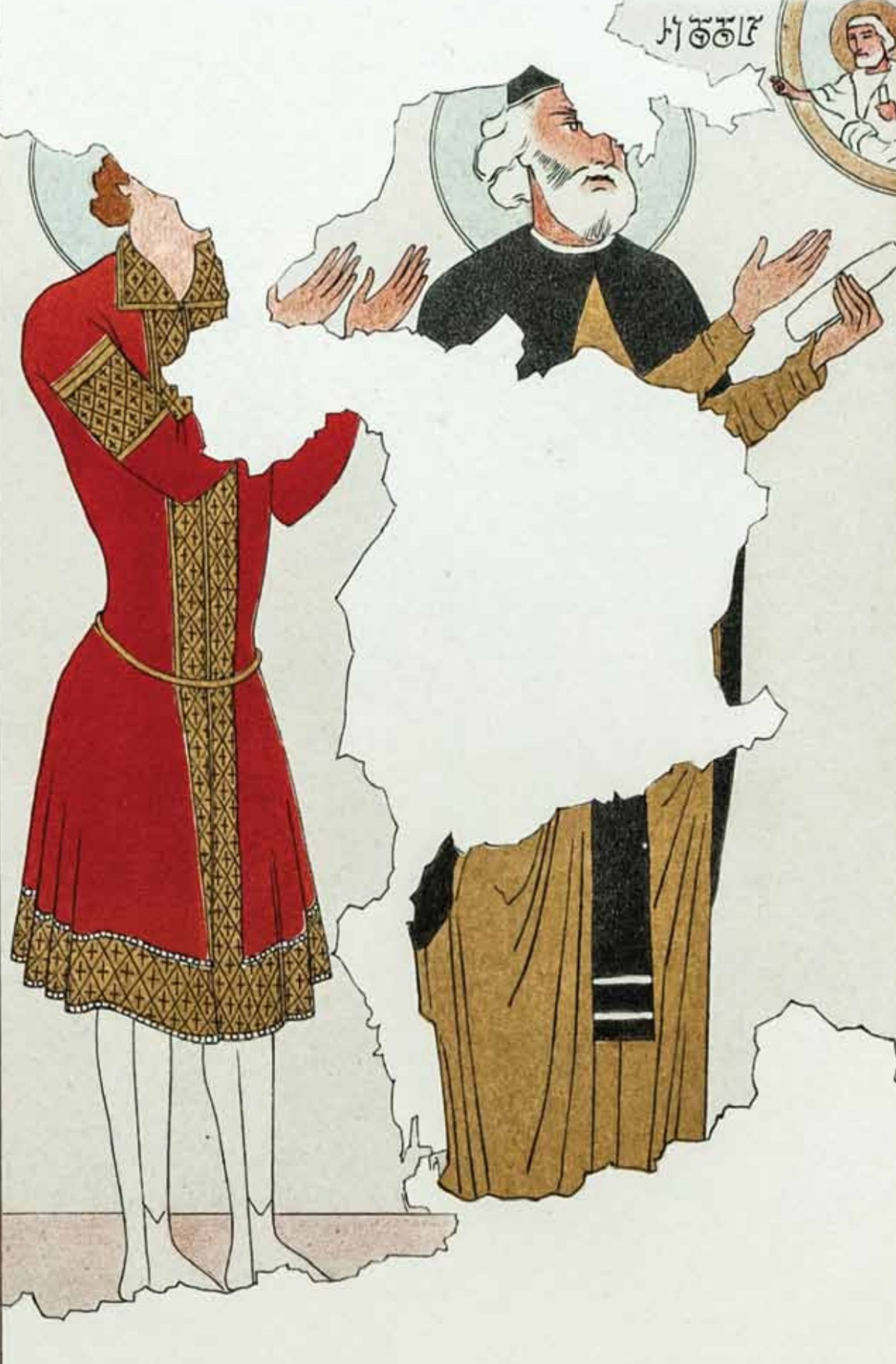 Georgie. Vie, deteils et peintures de l'eglise de Sion.